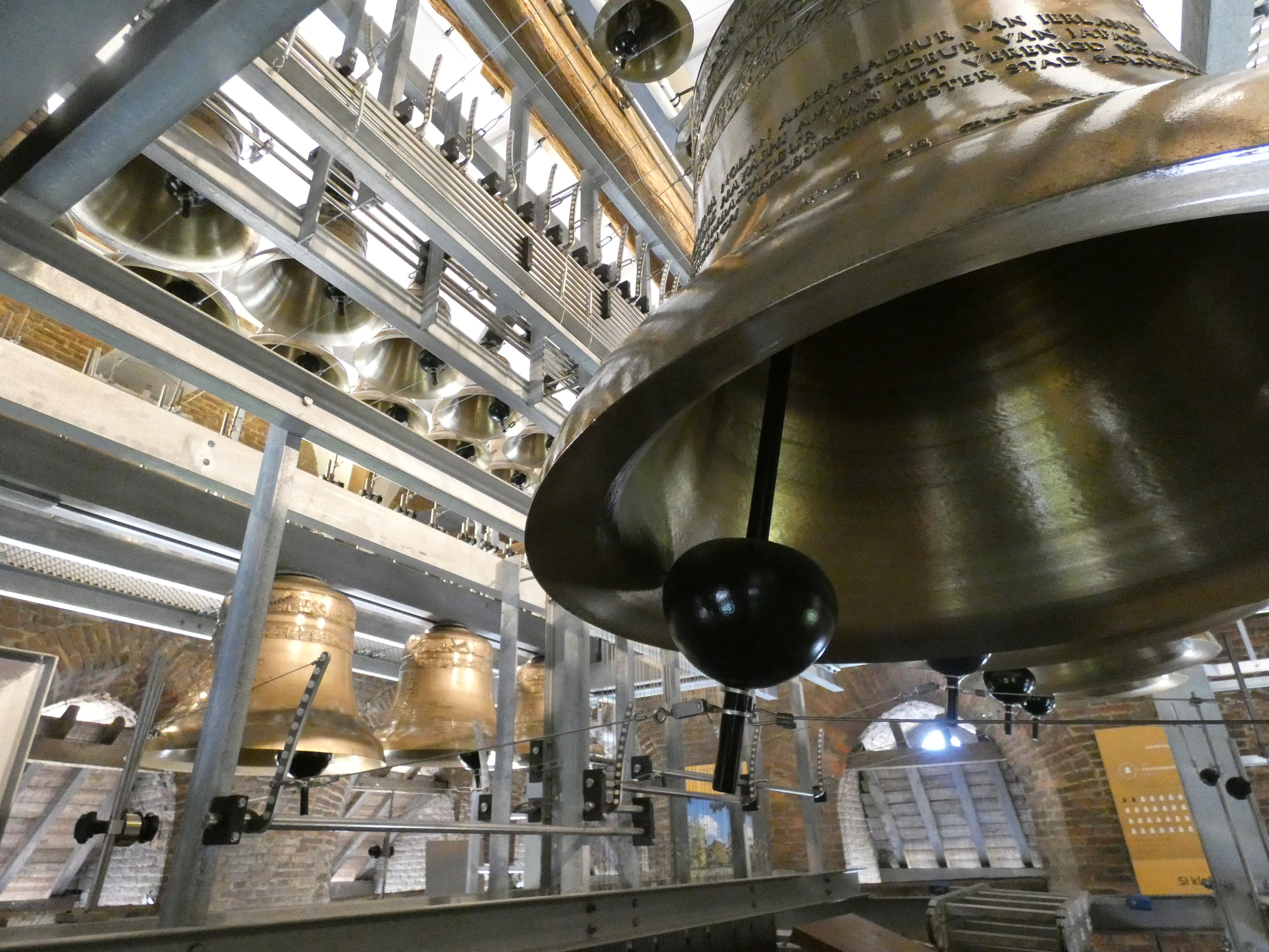 Foto van de Vredesbeiaard van Aarschot. Deze beiaard werd ingehuldigd op 11 november 2018 en ingespeeld door Jo Haazen.